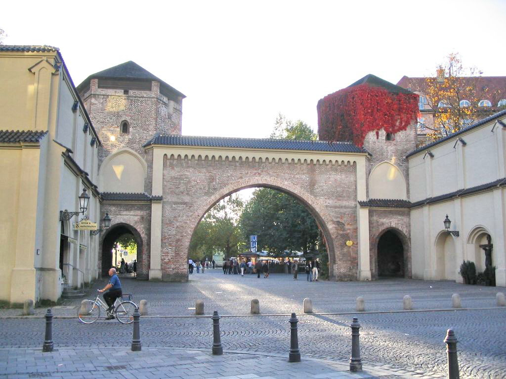 Sendlinger Tor in Munich (Bavaria)